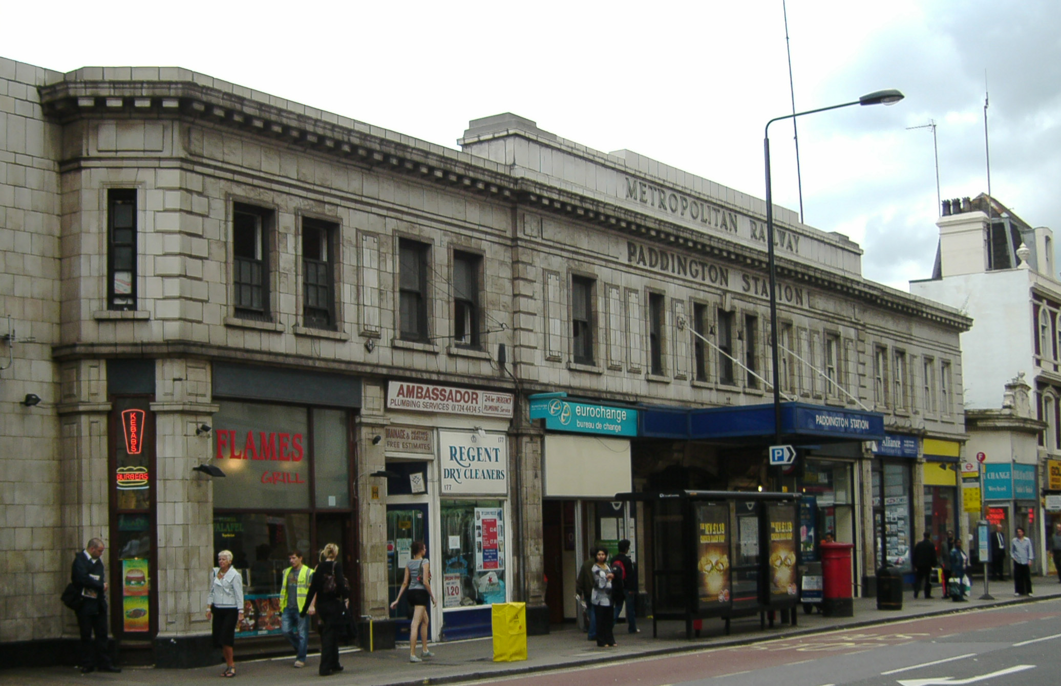 Eingang des Bahnhofs Paddington der District und Circle Line